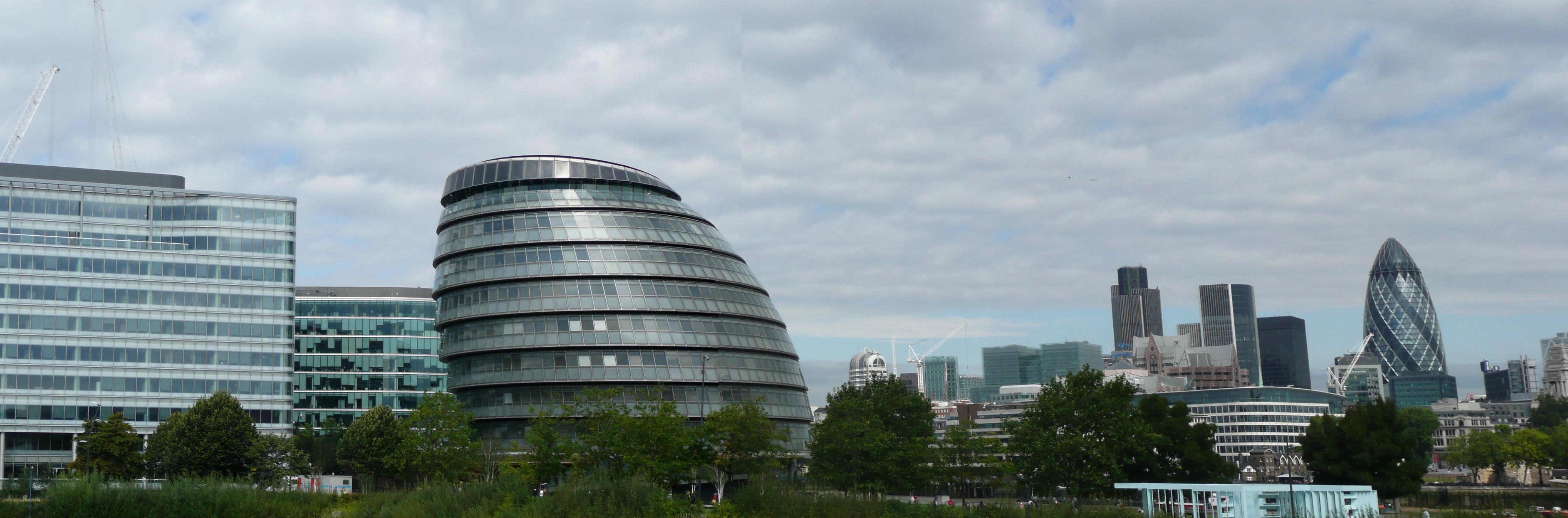 City Hall und The Gherkin von der Tower Bridge aus gesehen.